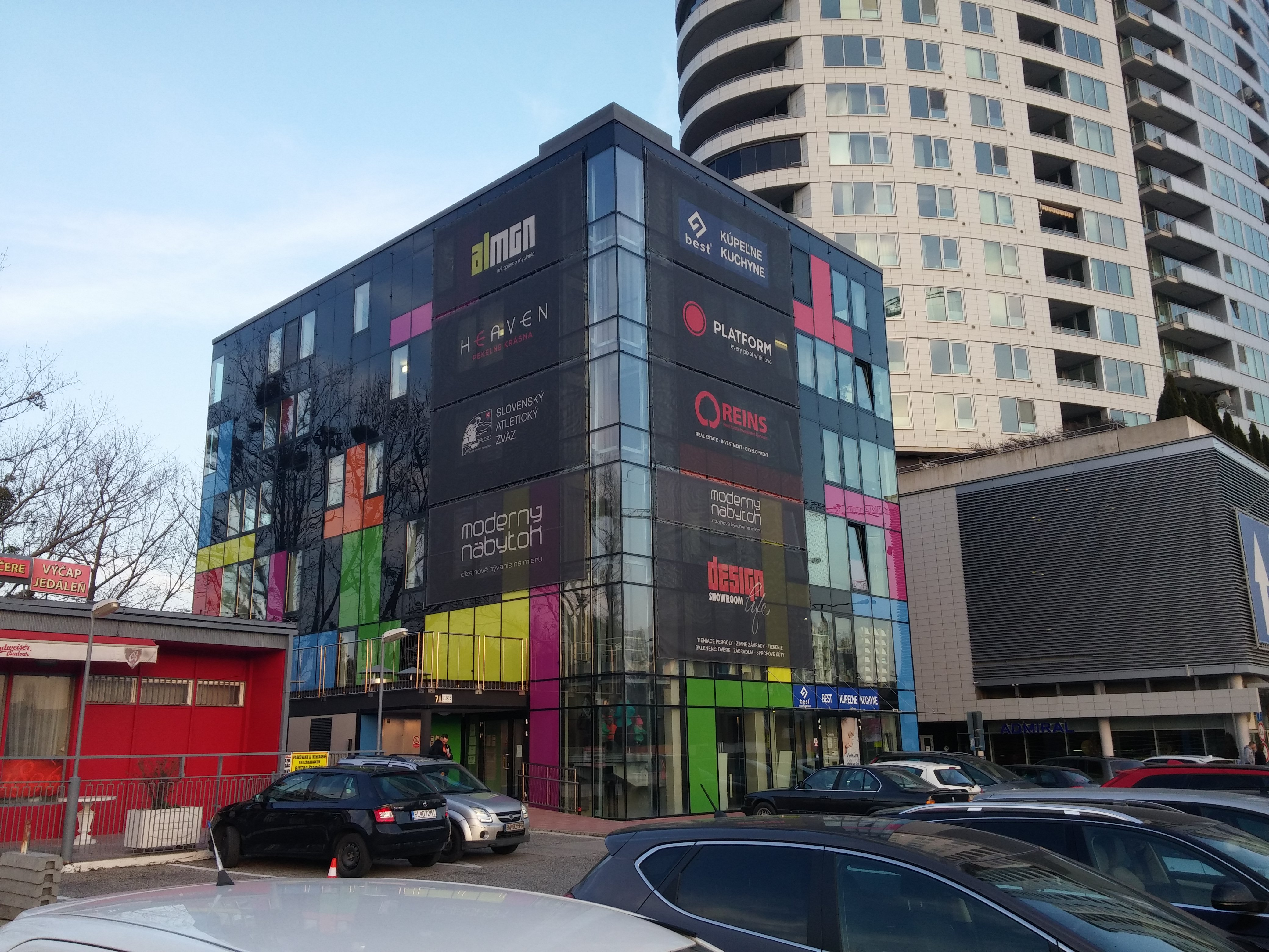 Bajkalská 7A, Nové Mesto, Bratislava